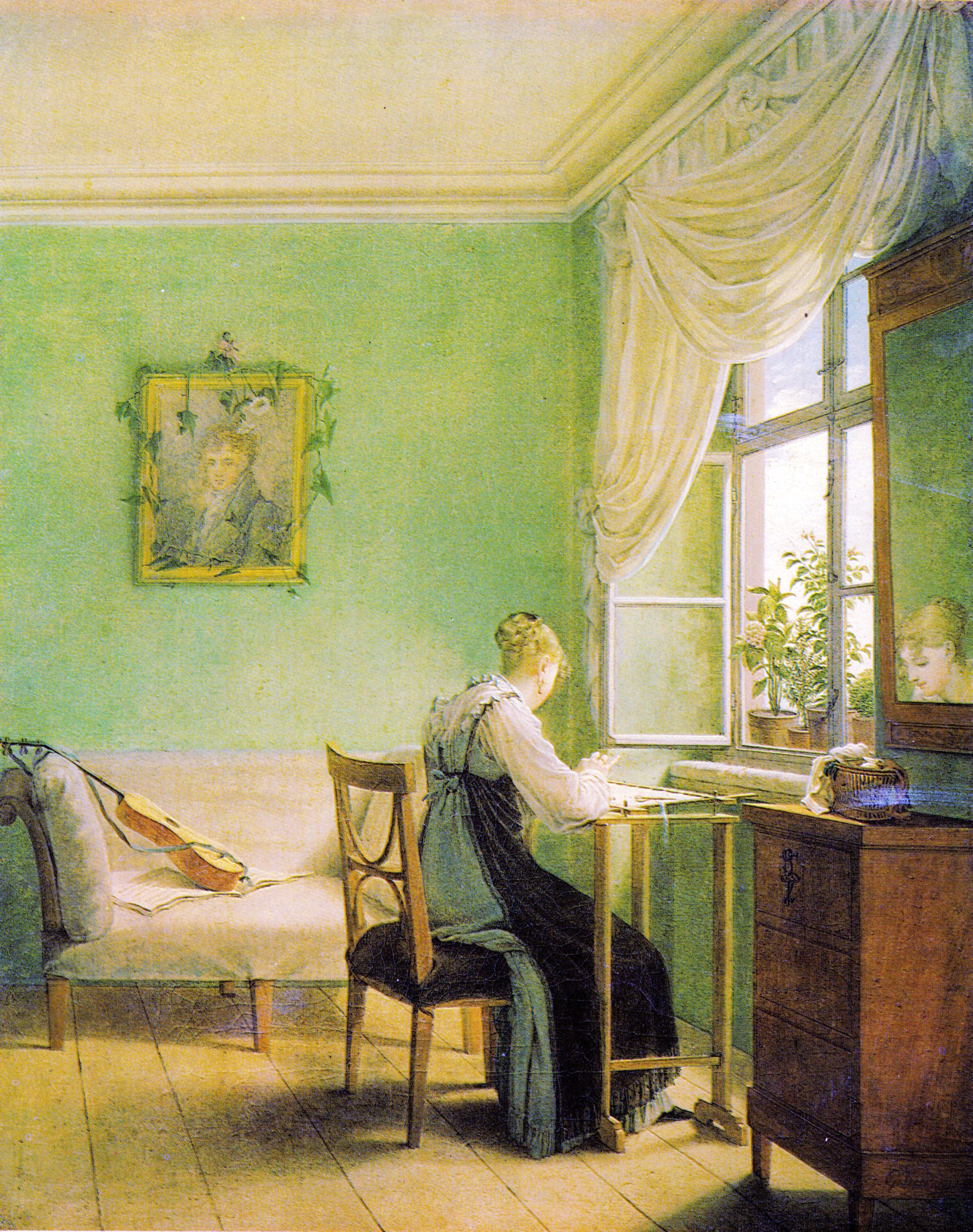 Erste Fassung 1812. Dargestellt ist Louise Seidler.